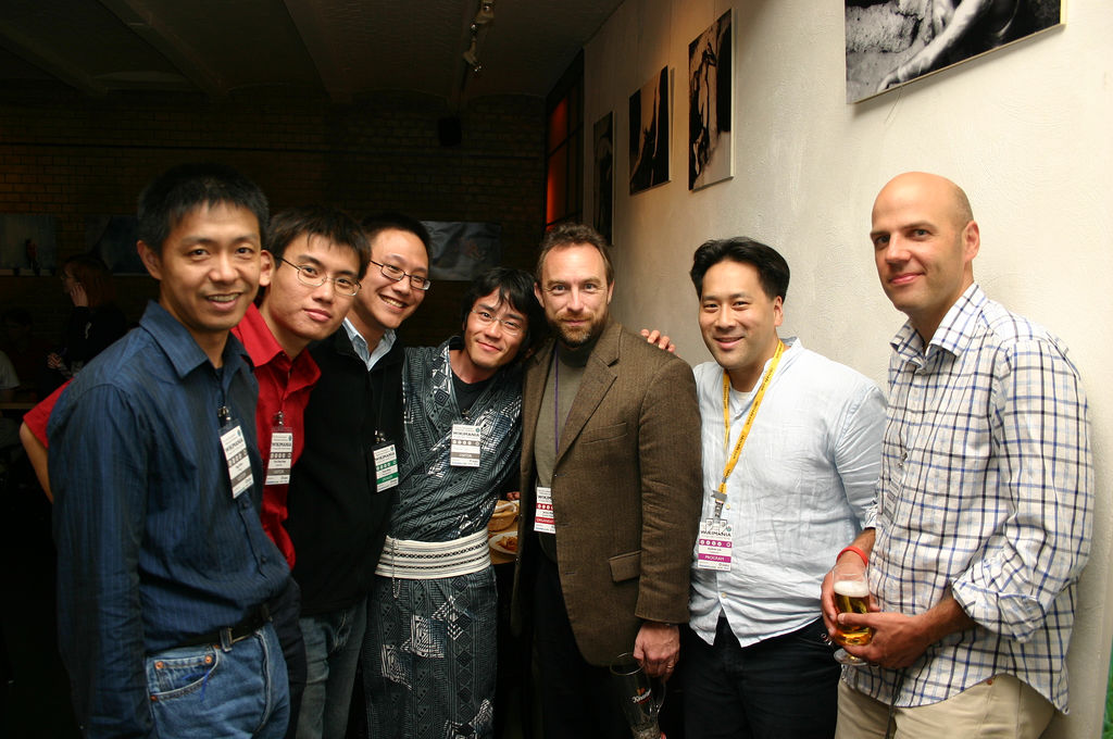 在2005年8月6日的維基舞會上，來自世界各國的維基人和相關人士聚集和交流。 左起wing，阿仁，虎兒，日本維基人太田尚志，吉米，Andrew Lih和瑞士人Stephan Meyer。 這照片是某人使用Andrew Lih的相機拍攝的。